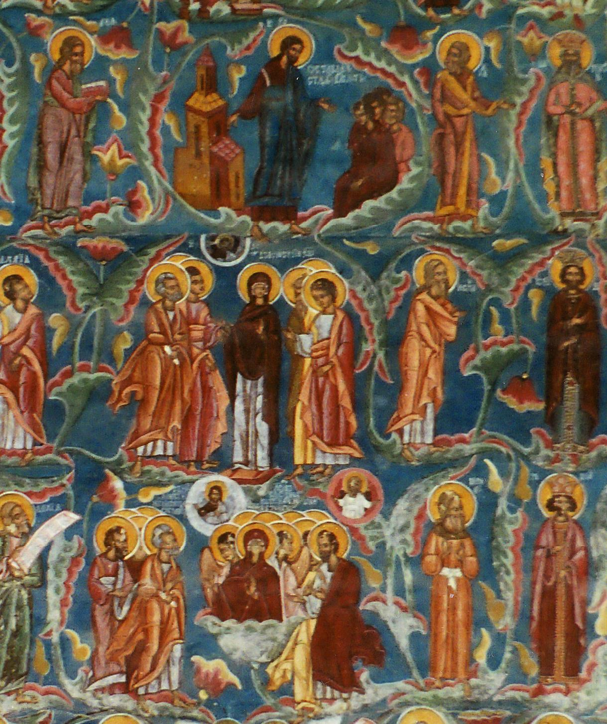 Voronet, Románia: templom, külső freskórészlet (Jesse fája)